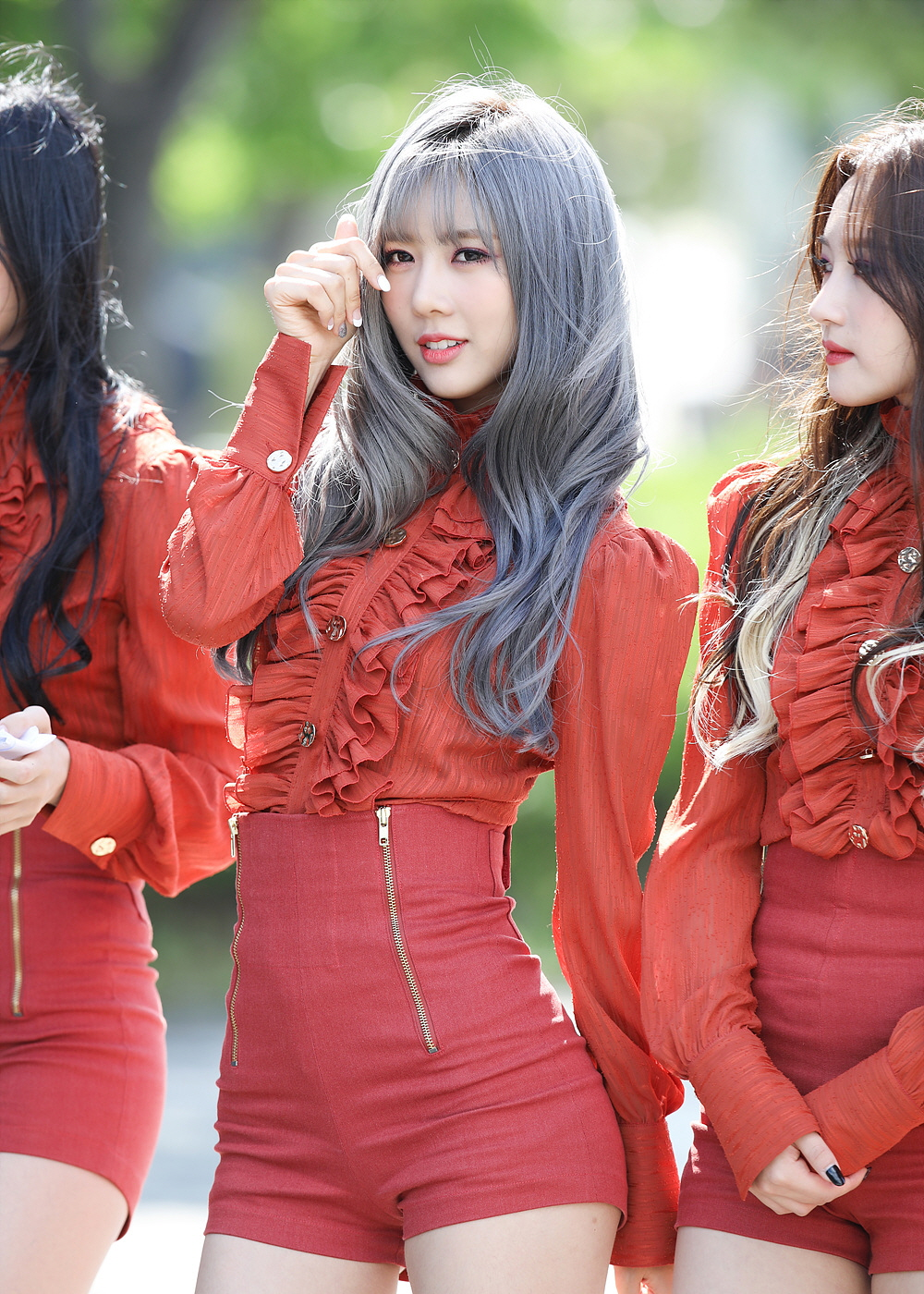 180612 드림캐쳐 유앤아이 막방미니팬미팅